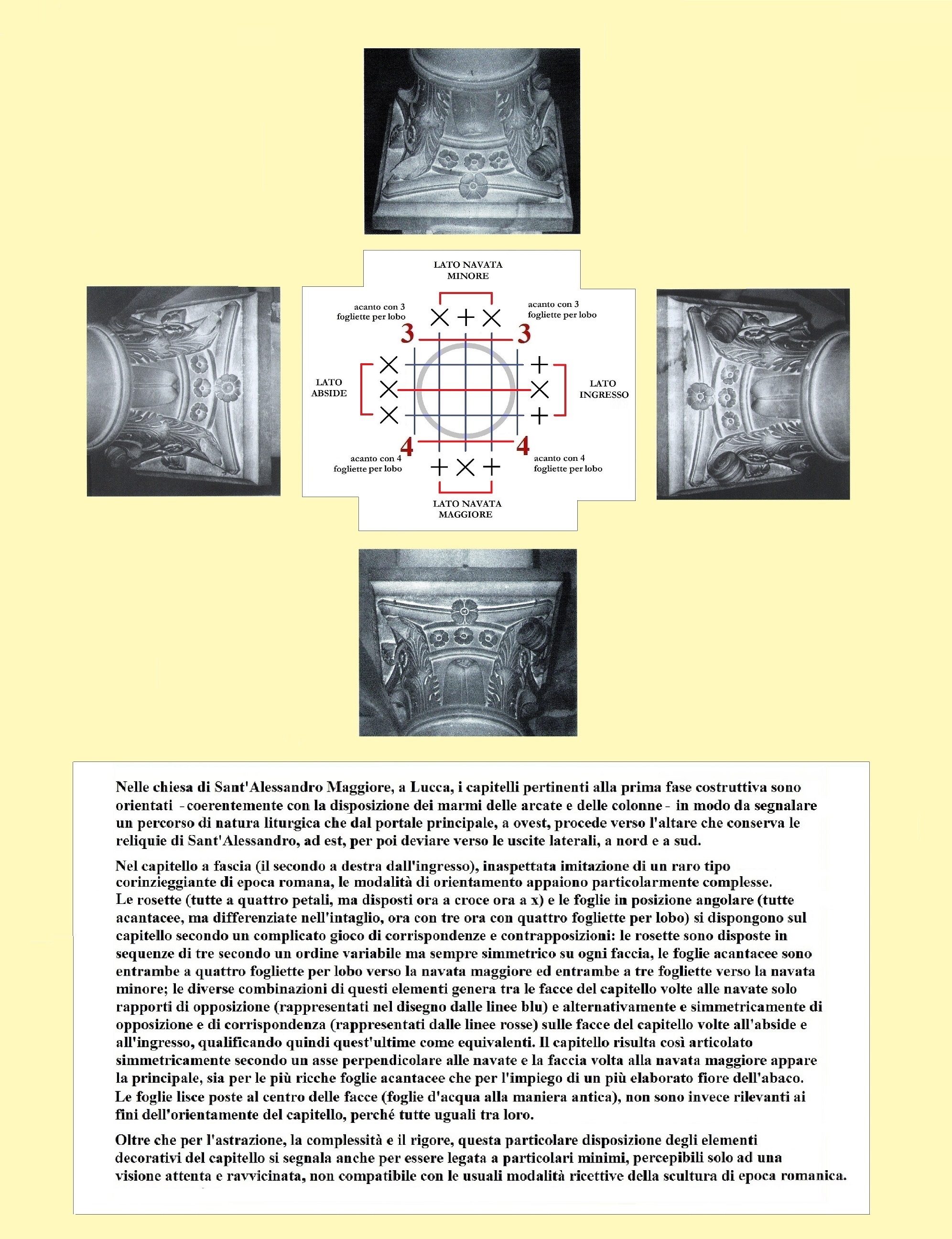 Sant'Alessandro, Lucca. Capitello orientato